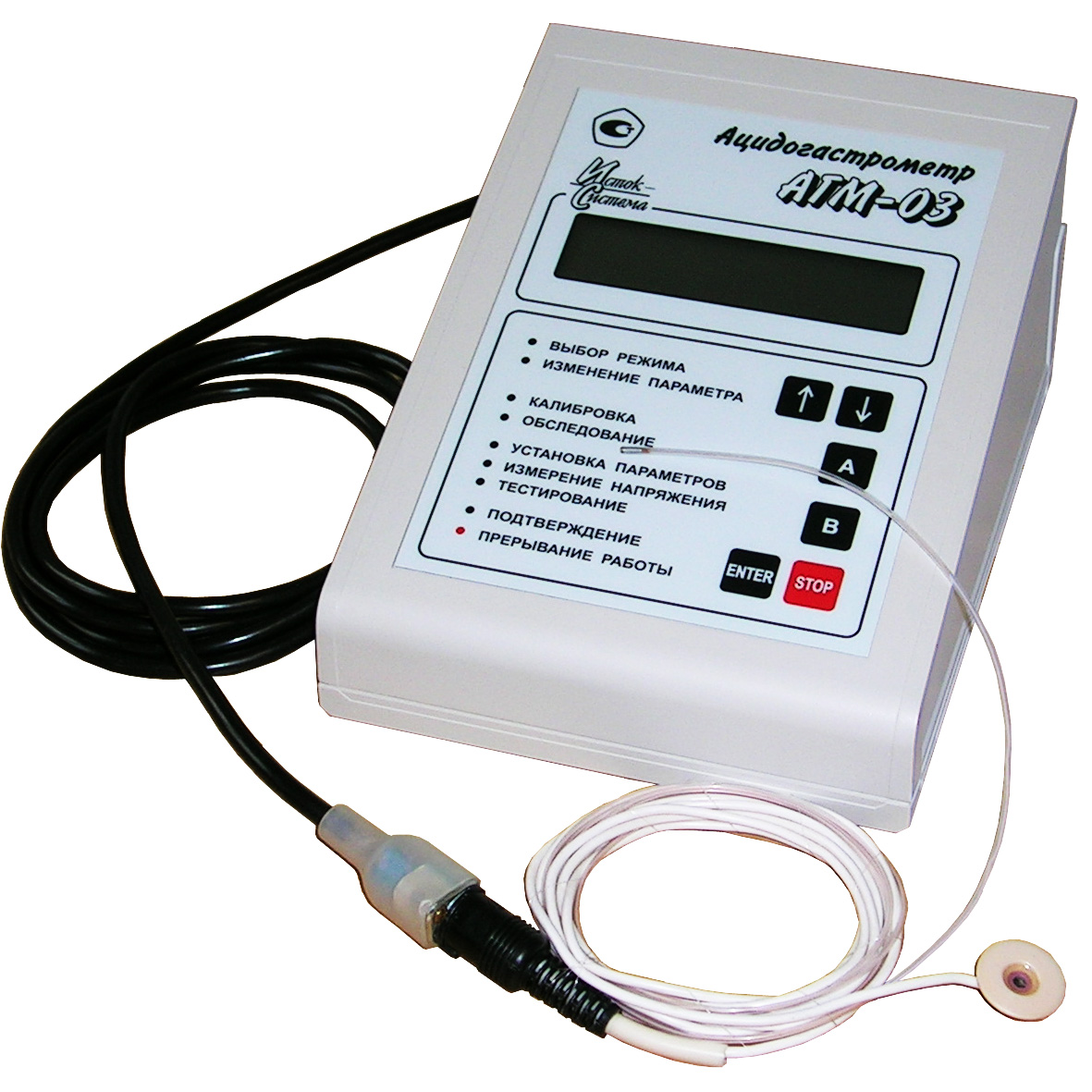 AGM-03_Acidogastrometr